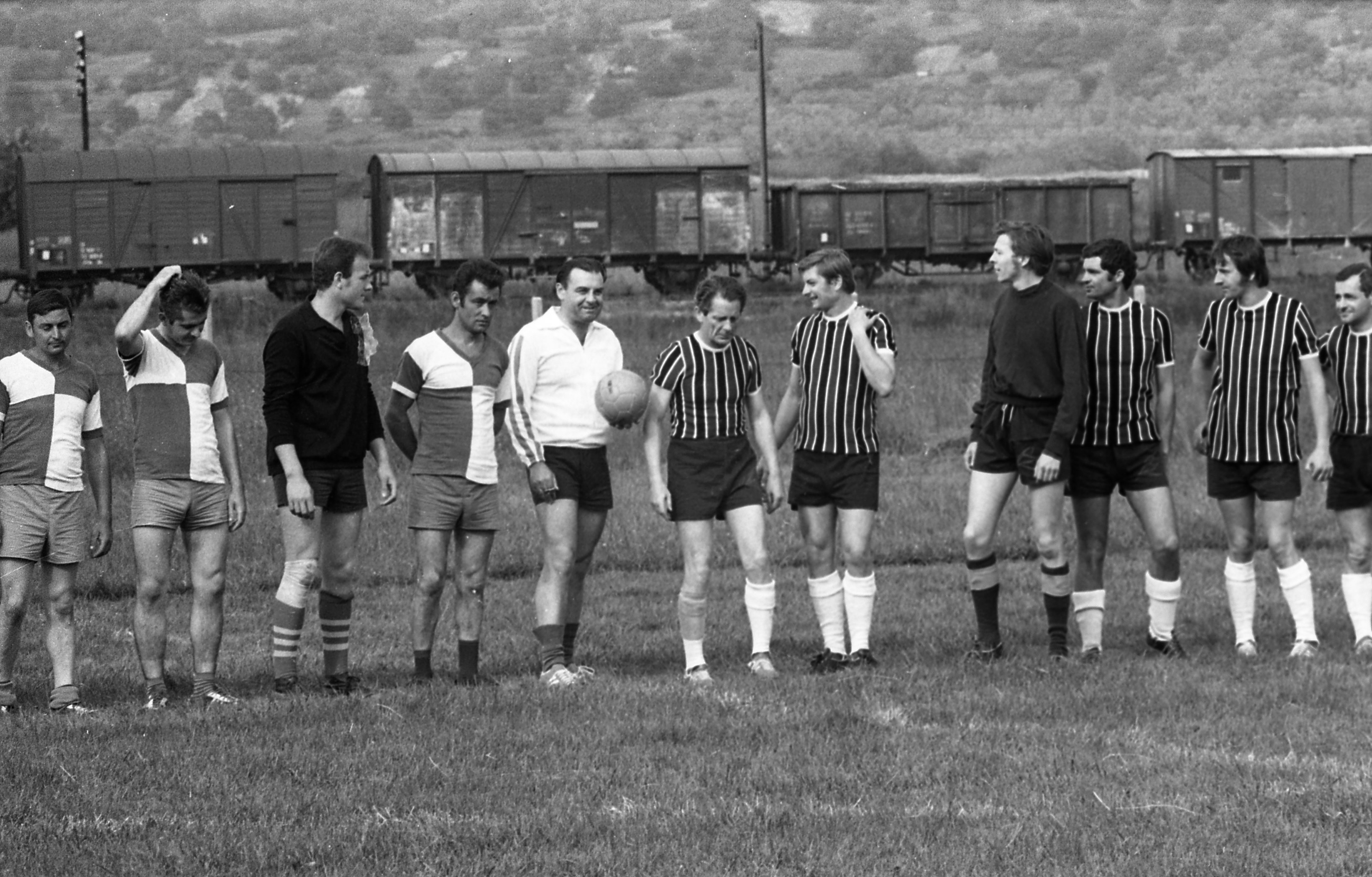 Galgamácsa sportpálya, a játékvezetőtől balra Váckisújfalu labdarúgó csapatának tagjai. Jobbra a váckisújfalui Petőfi TSZ meghívására érkezett színészválogatott csíkos mezben balról jobbra Komlós András, Fülöp Zsigmond, Úri István, Szersén Gyula, Tahi Tóth László, ?. Location: Hungary Title: A színész válogatott \